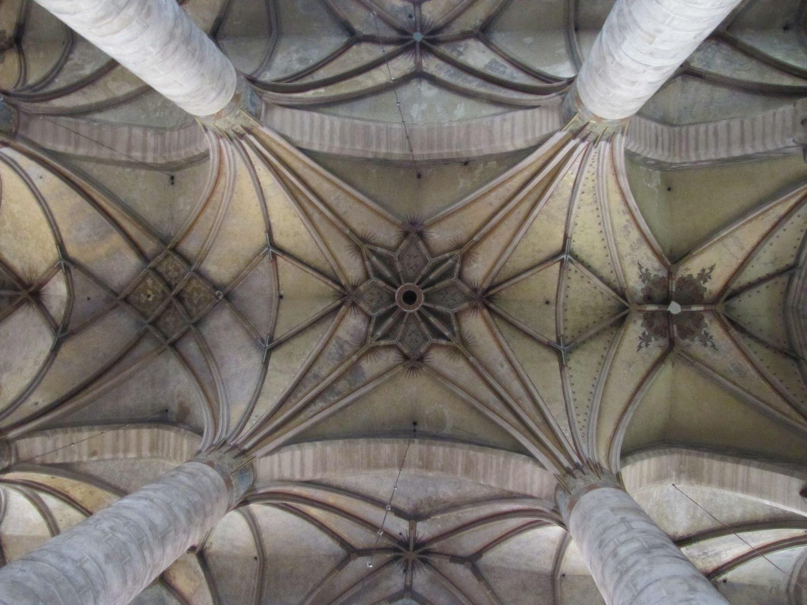 Kostely v Plzni katedrála sv. Bartoloměje - detail klenby